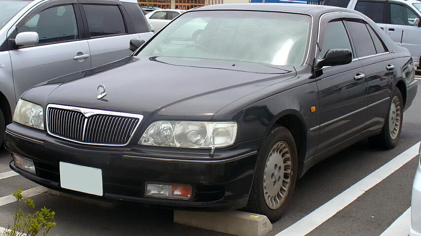 3代目日産・シーマ